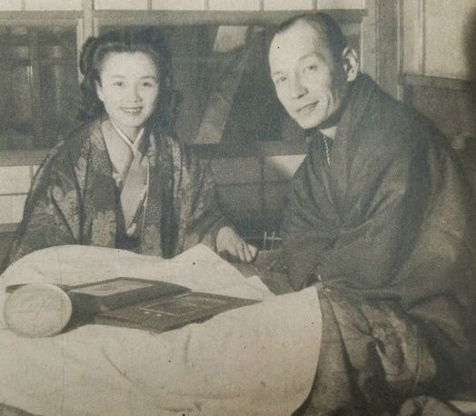 池真理子（左）・鈴木勝（右）夫妻